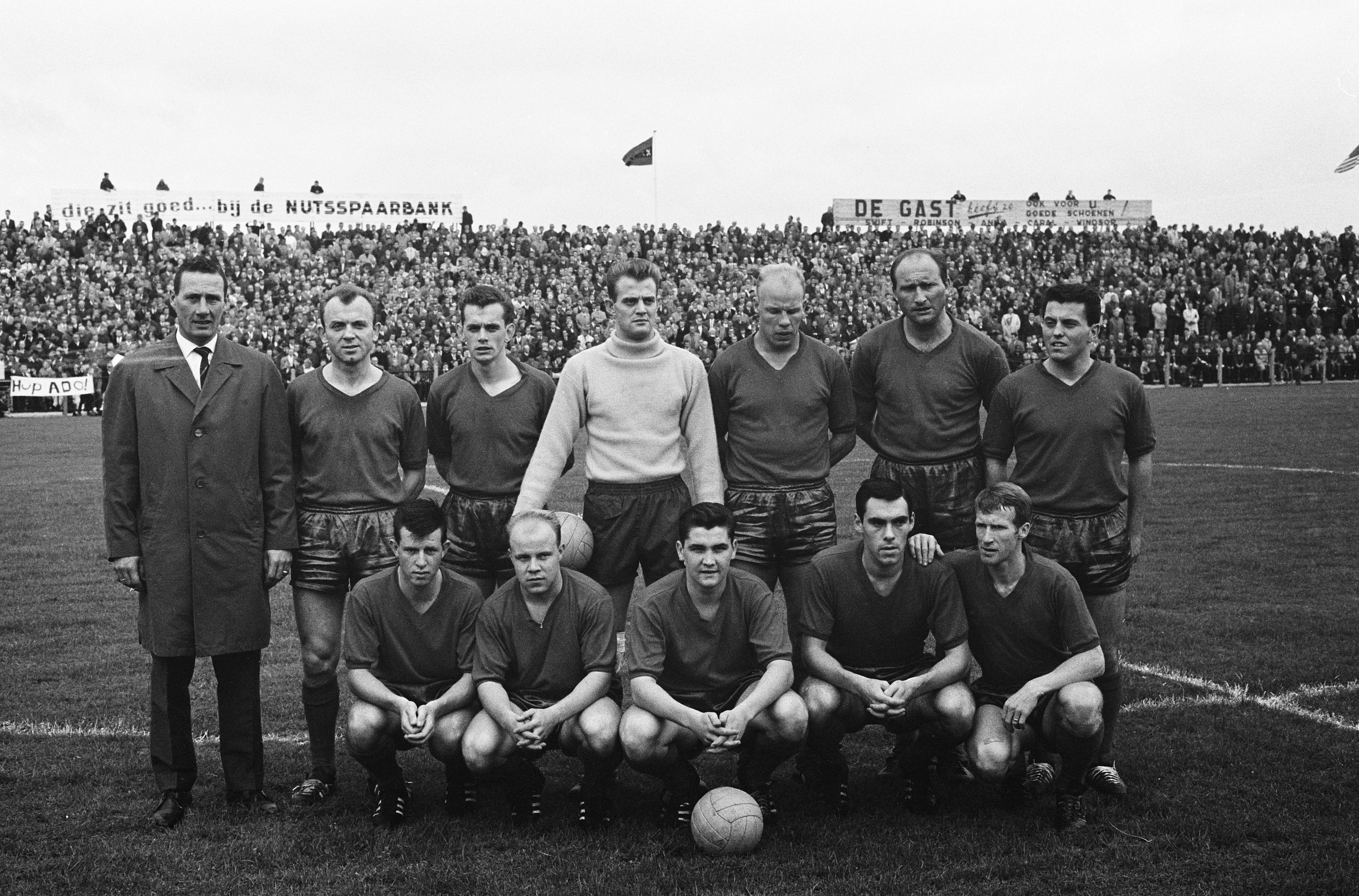 Équipe du PSV Eindhoven (1963). Debout, de gauche à droite : Bram Appel (entraîneur), Fons van Wissen, Miel Pijs, Gerrit Bals (gardien de but), Roel Wiersma, Toon Brusselers, Ger Donners ; Accroupis, de gauche à droite : Lambert Verdonk, Gerard Hoenen, Piet Giesen, Bert Theunissen, Anton Allemann.